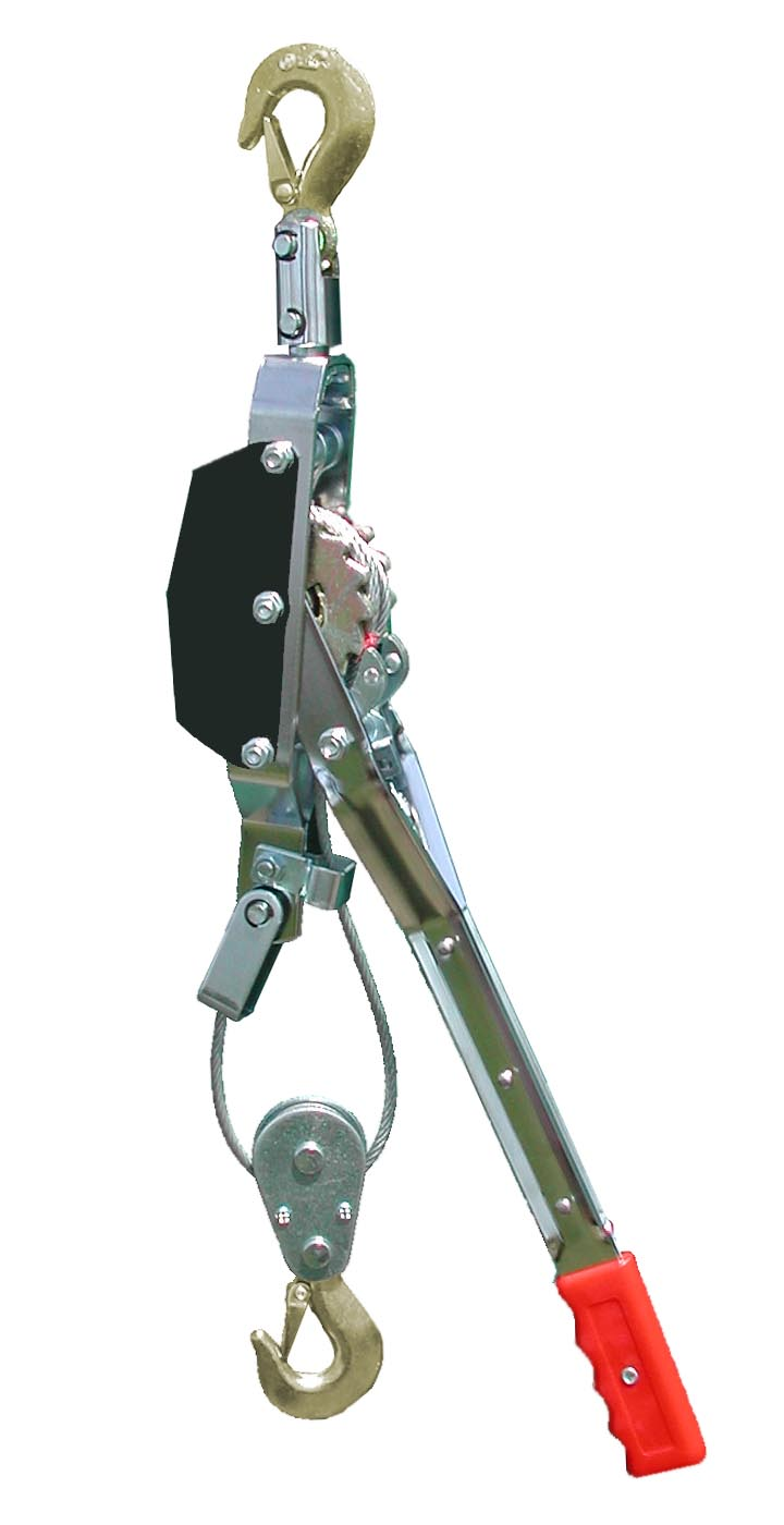 Spakblock